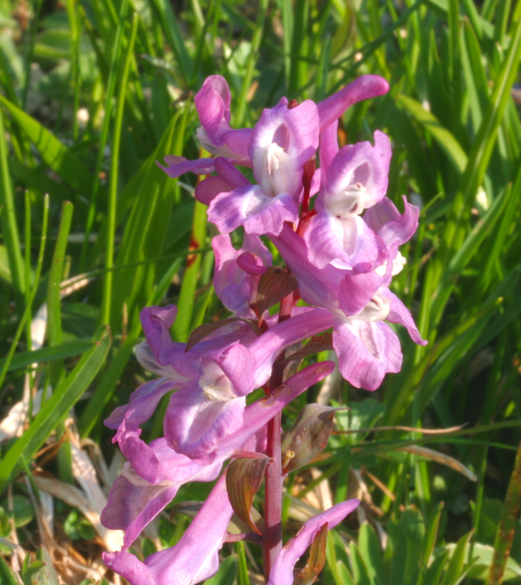 Corydalis_cava (Colombina cava) Località : Valmorel, Limana (BL), 800 m s.l.m.